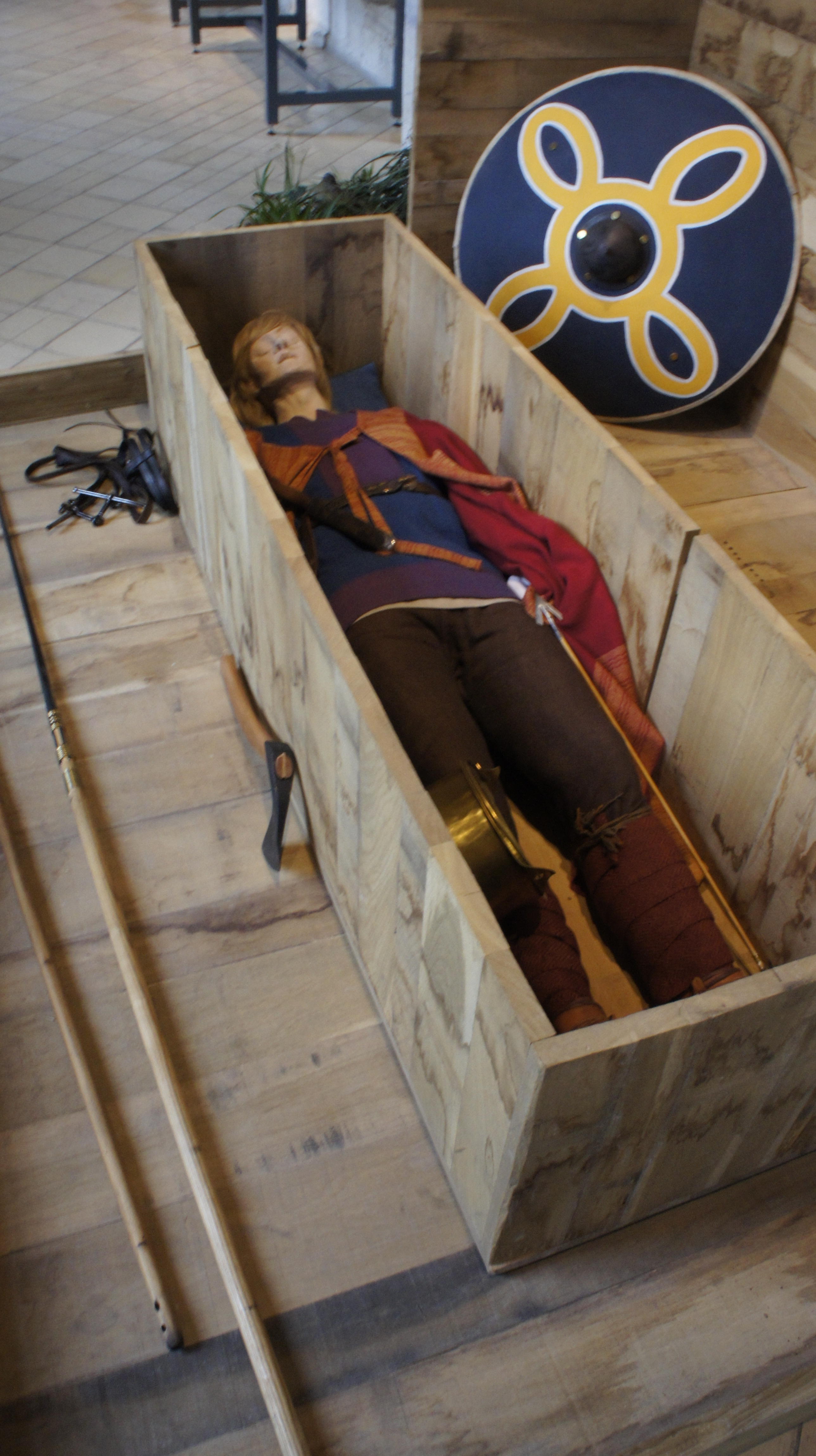 Présenté lors de son passage au musée de Reims . Réalisation des artéfacts : Arian Ziliox, Réalisation de la scénographie : Agence Zen+dCo .